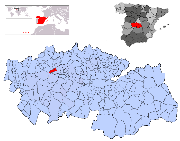 Cazalegas en la provincia de Toledo